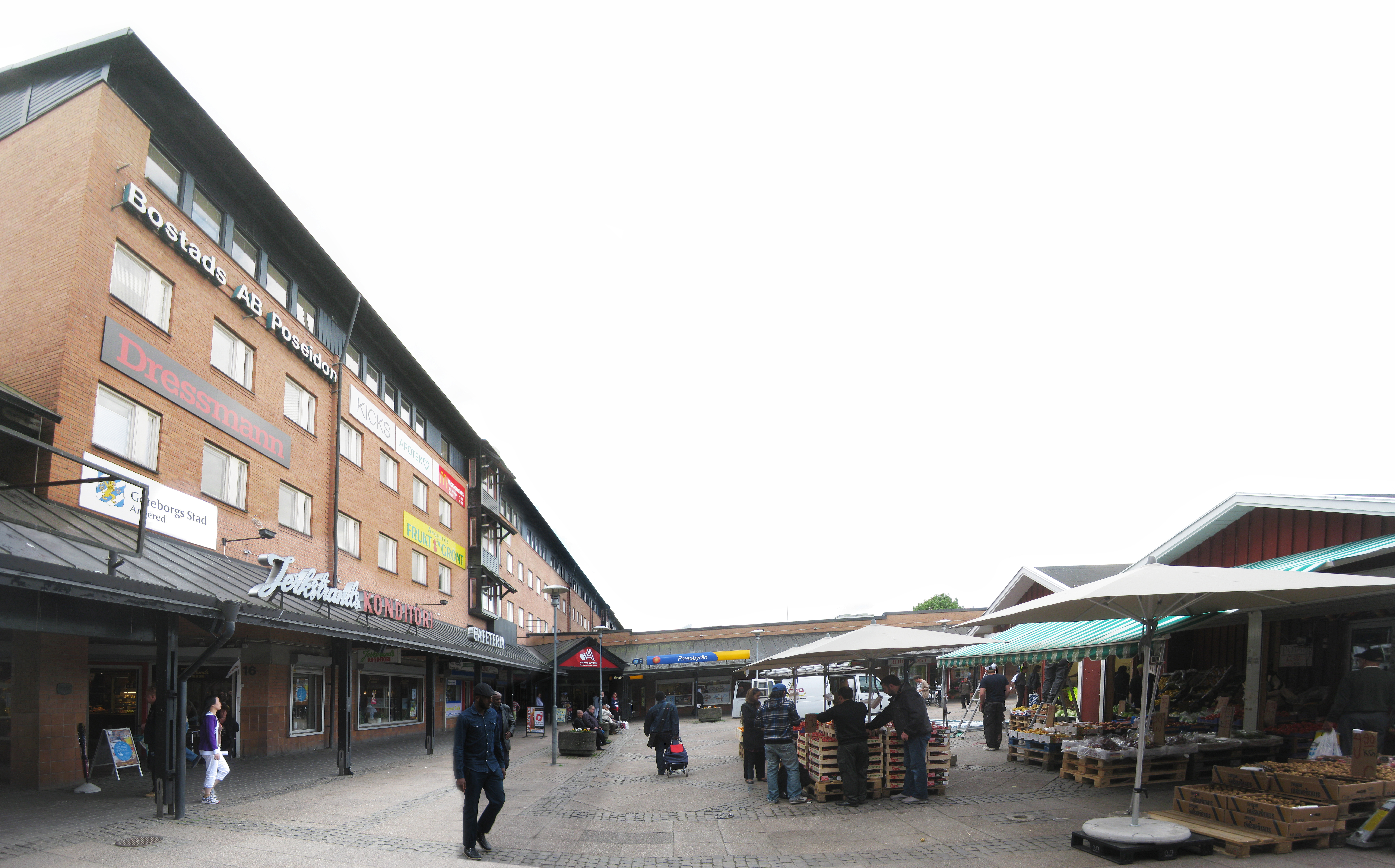 Angered Centrum i maj 2012.